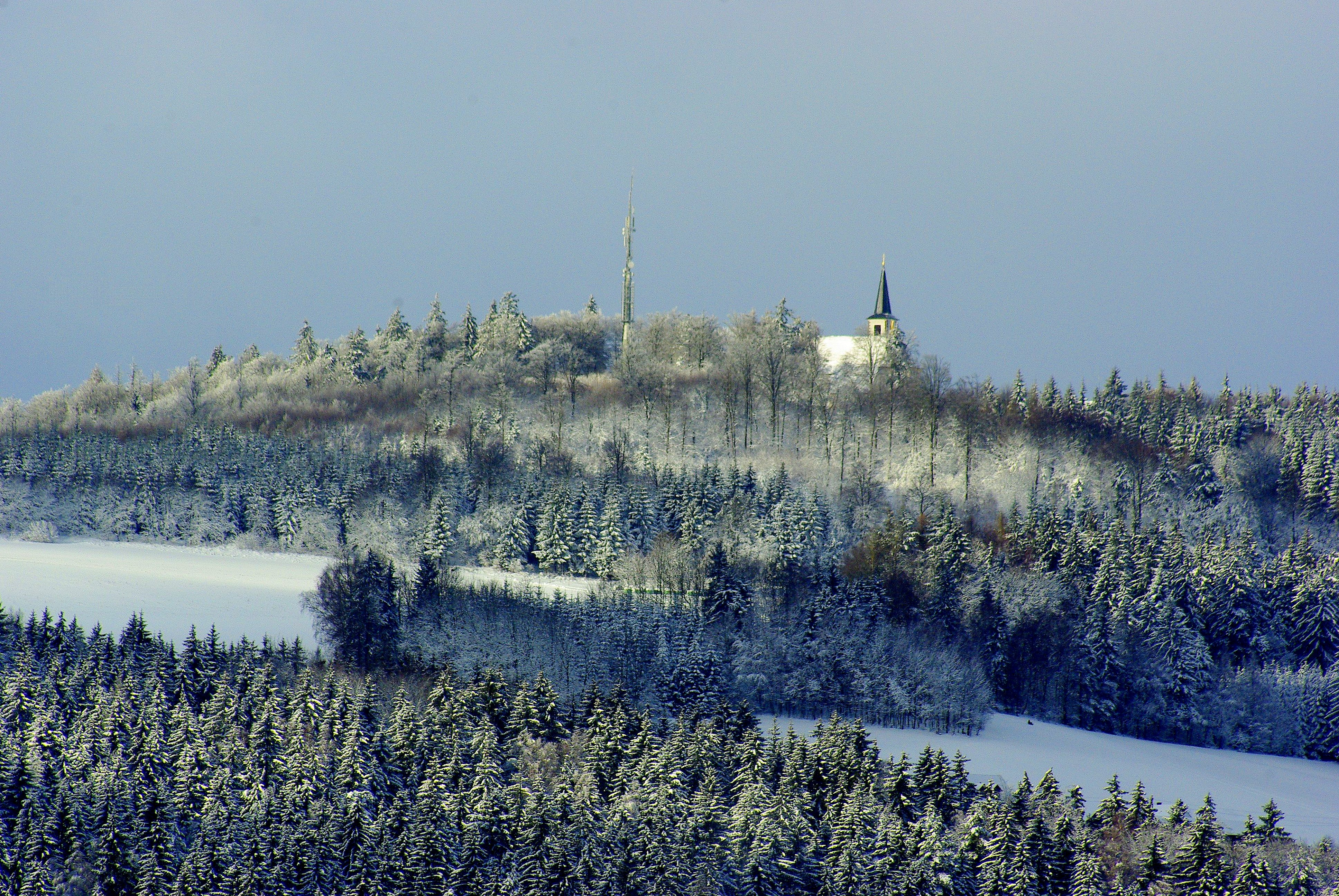 Der Fahrenberg ist ein seit dem 13. Jahrhundert bekannter Wallfahrtsort in Bayern. Er gehört zur Gemeinde Waldthurn in der Oberpfalz.